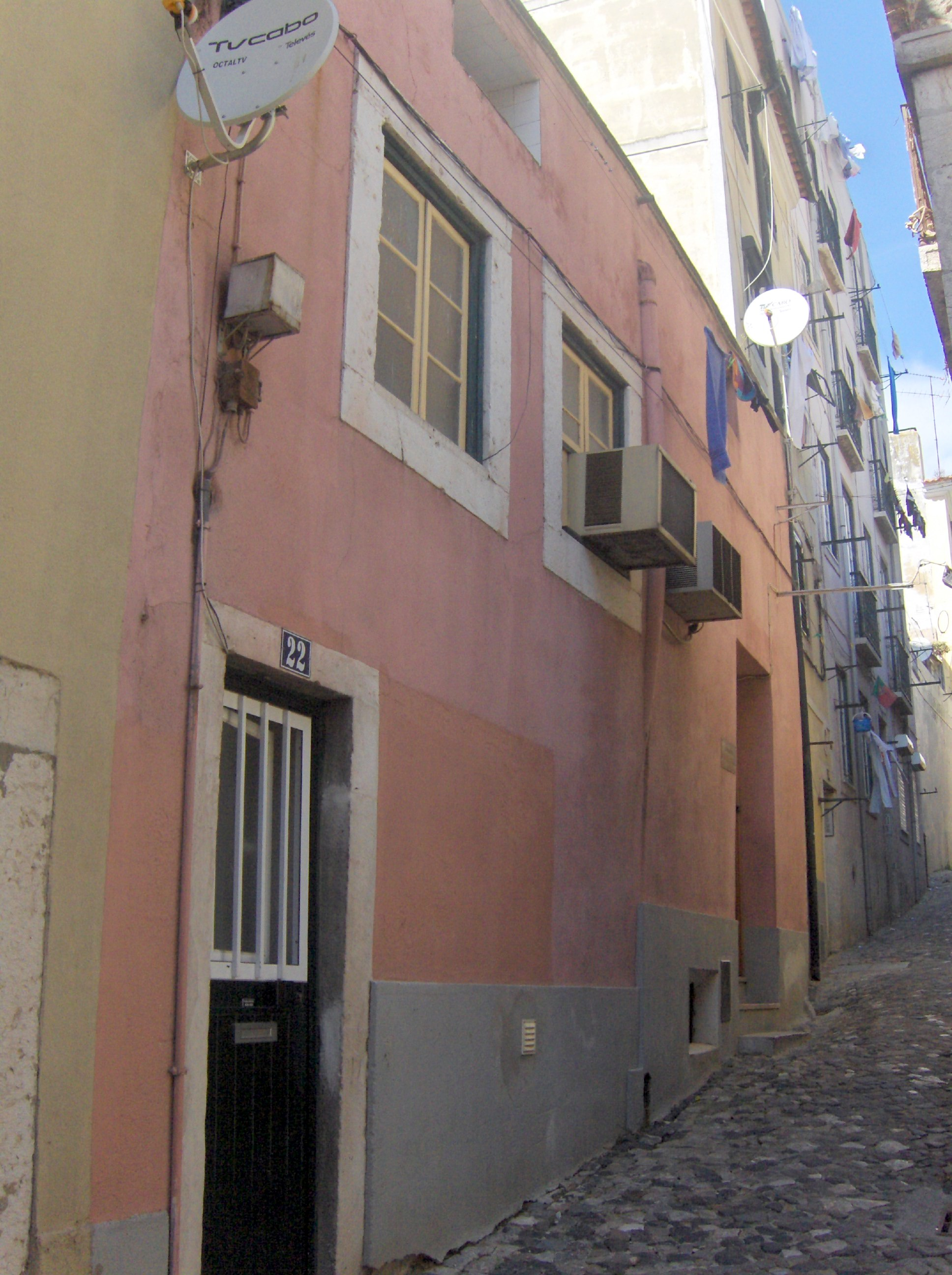 Casa onde cresceu a fadista portuguesa Mariza, Mouraria, Lisboa.